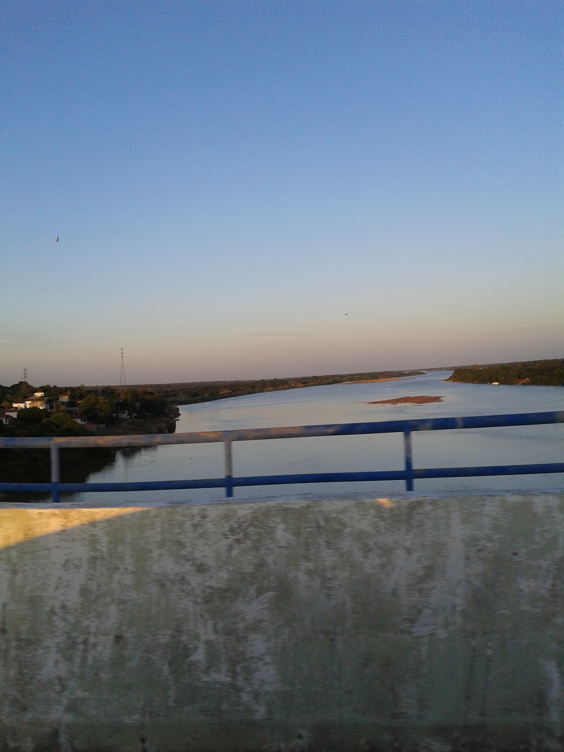 Foto tirada de cima da ponte que liga as cidades de Januaria e Pedras de Maria da Cruz, Minas Gerais.